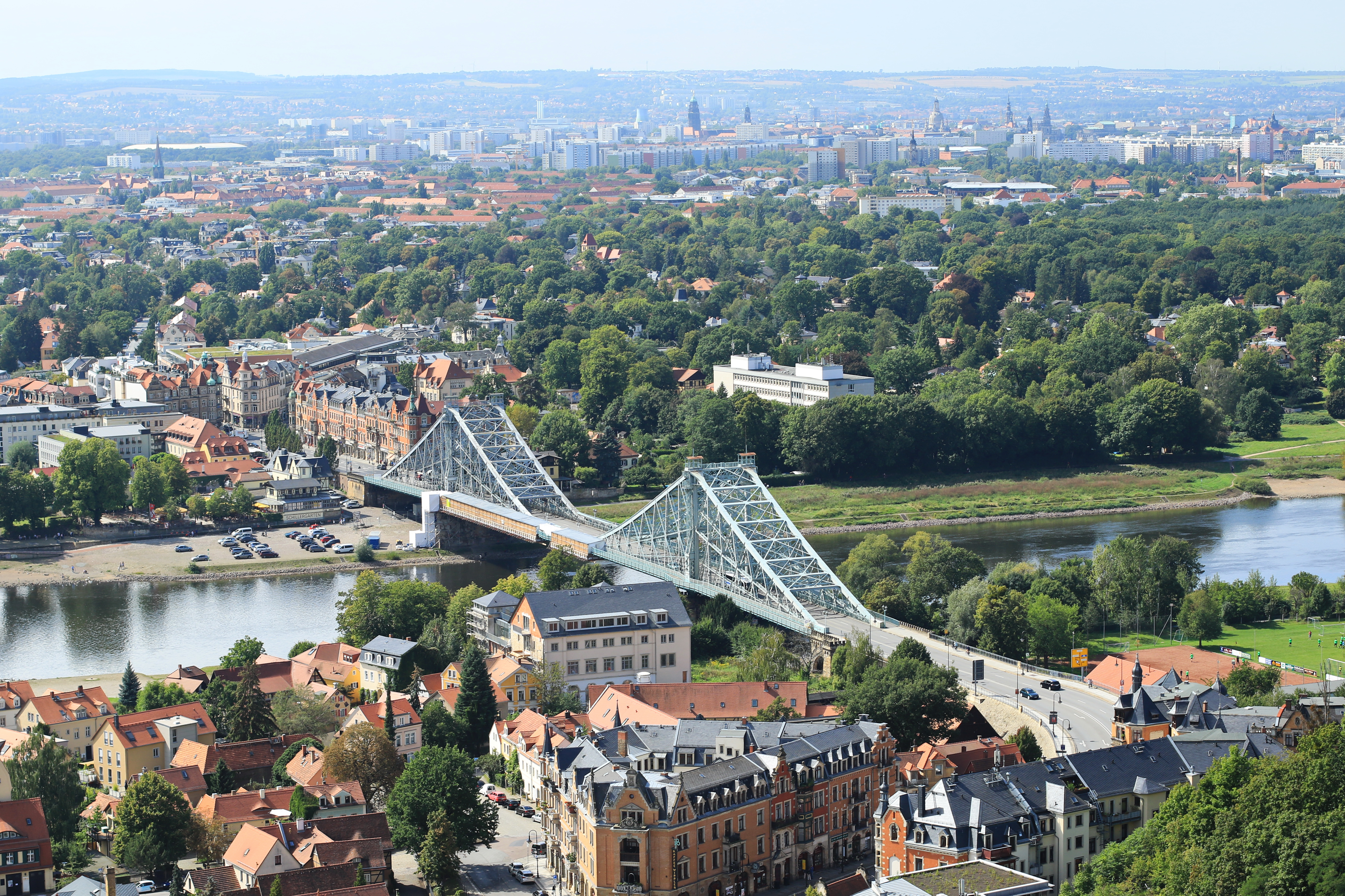 Dresden-Blick von der Aussichtsplatform Loschwitz..